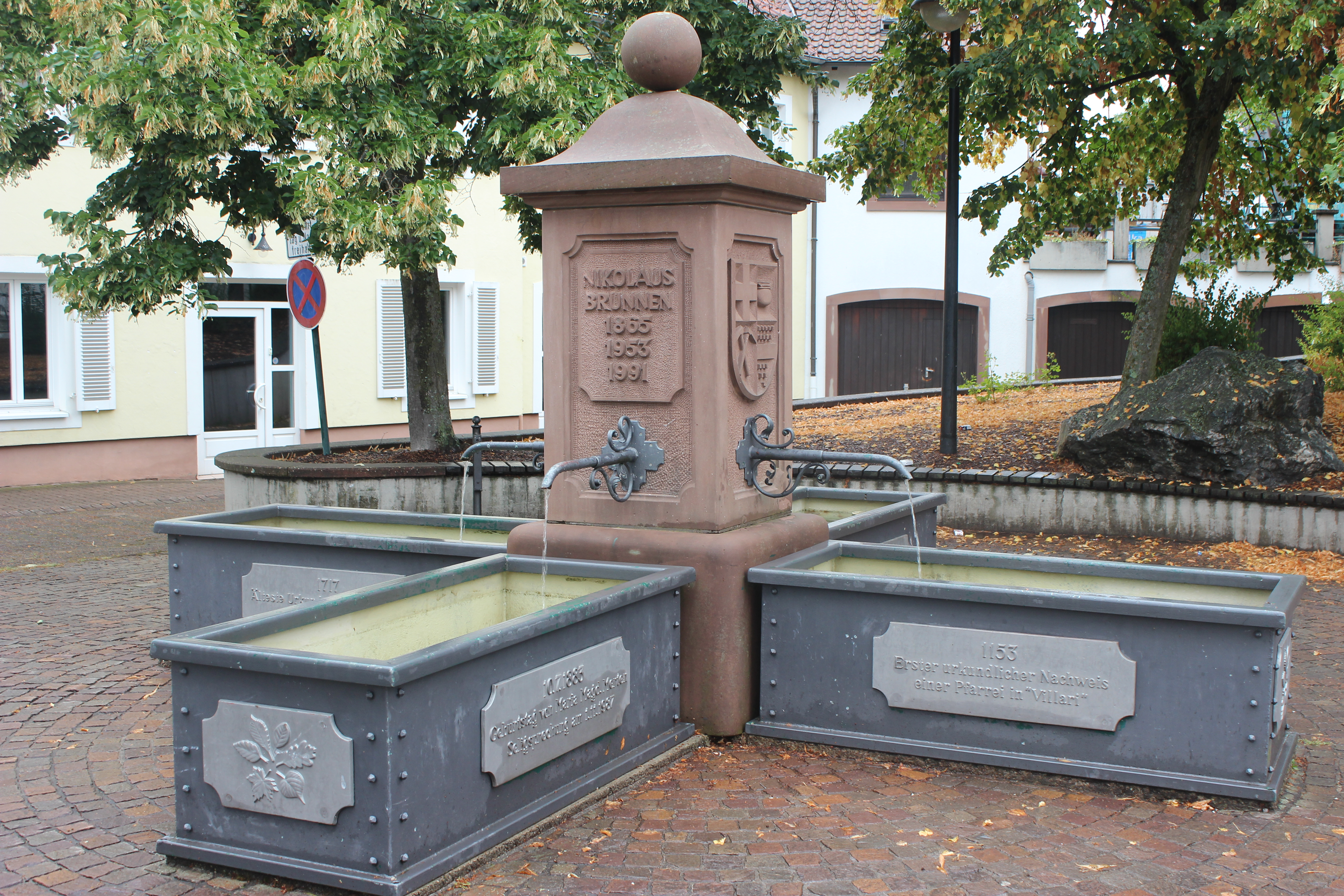 Der Nikolausbrunnen ist ein Erzählbrunnen. Auf der Sandsteinsäule dokumentiert er die Städtepartnerschaft mit der ostfranzösischen Stadt Etain (Nähe Verdun) und auf den acht Seiten der vier Wassertröge die wichtigsten Ereignisse in der Geschichte des Ortes.